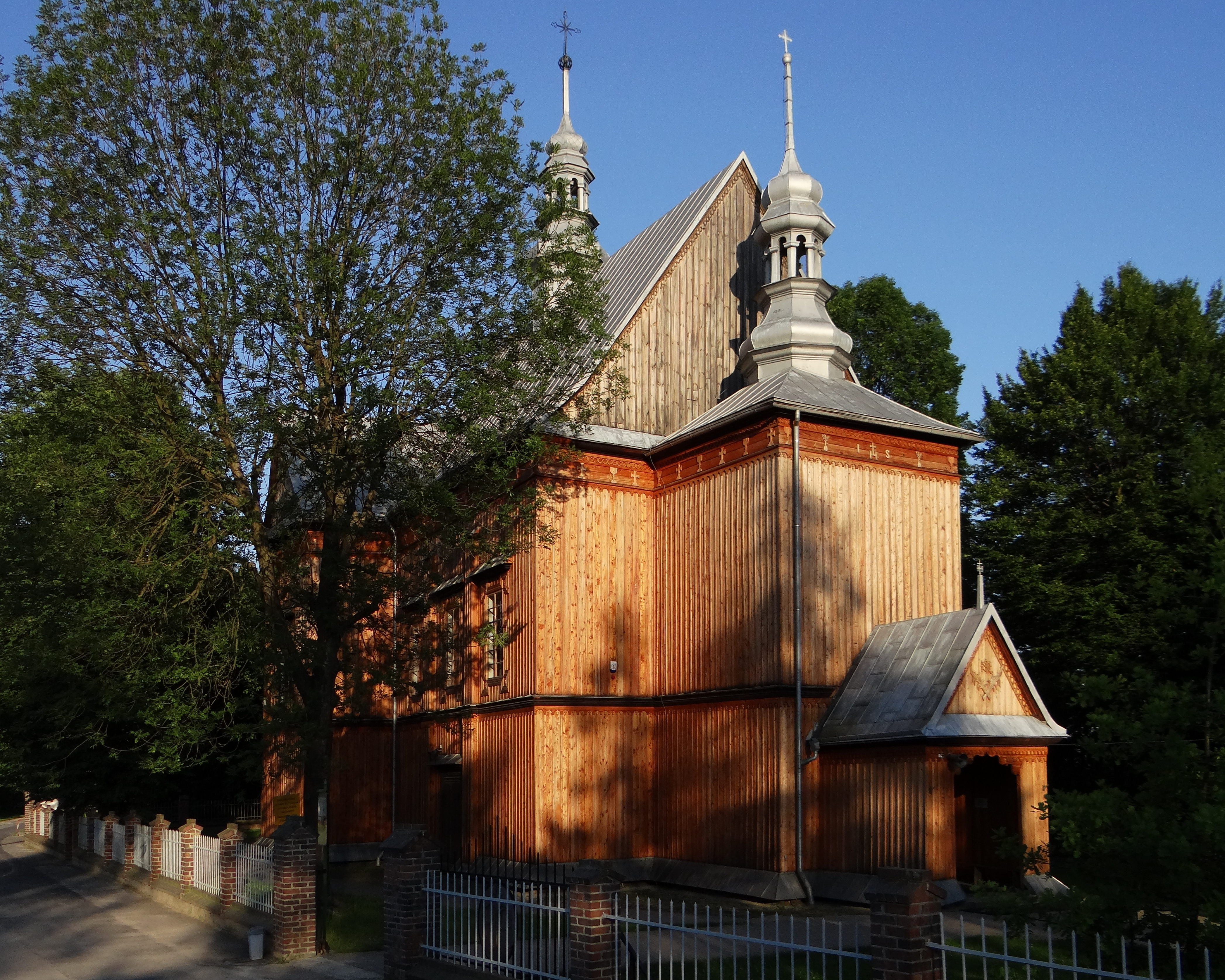 Zdjęcie wykonane w miejscowości Krzeszów, powiat niżański.